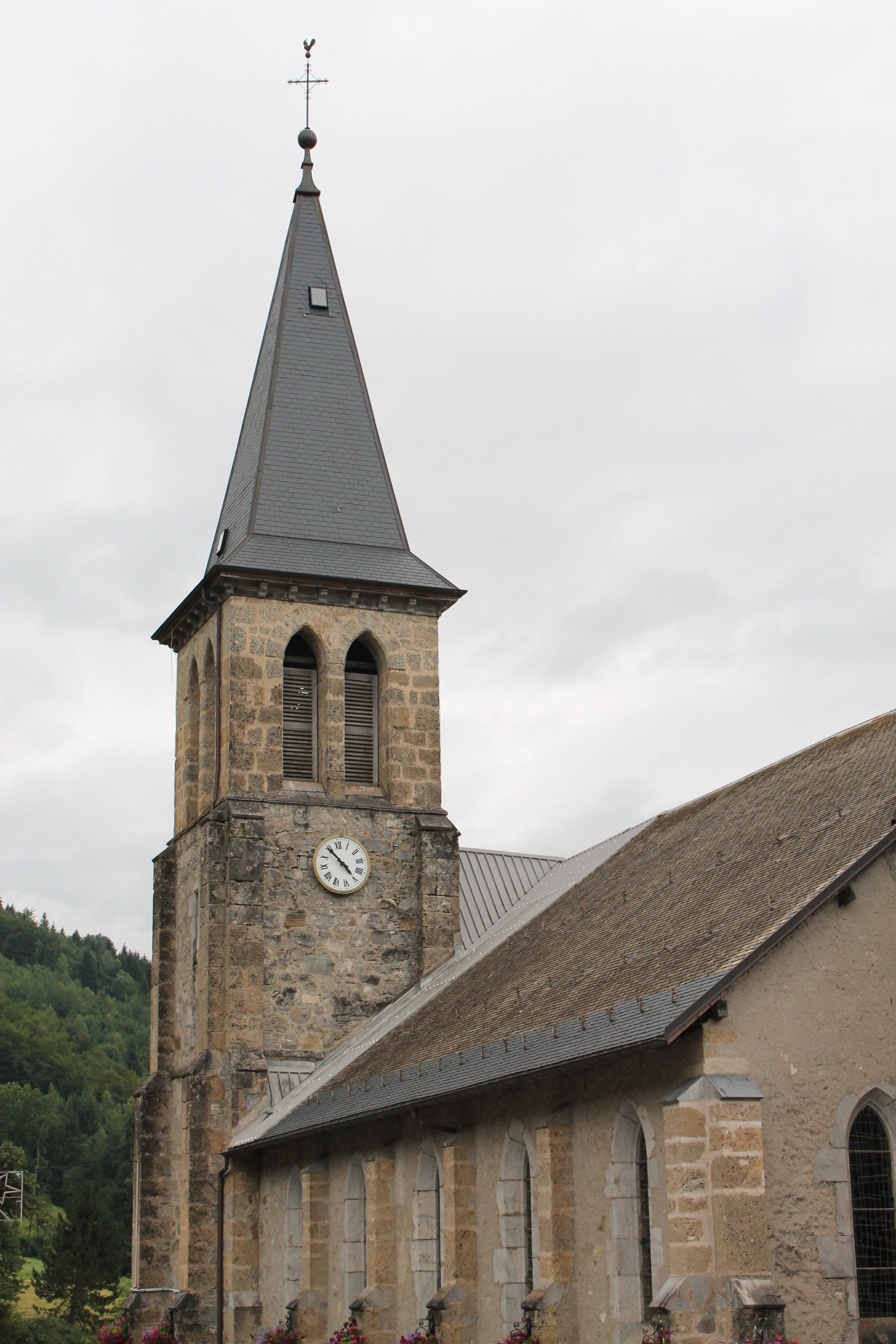 Clocher de l'église Saint-Maurice de Serraval (1864)